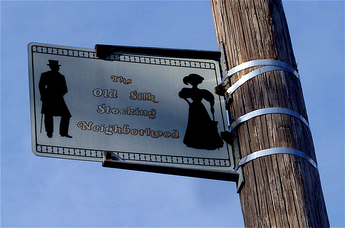 Old Silk Stocking Neighborhood, Kokomo, IN